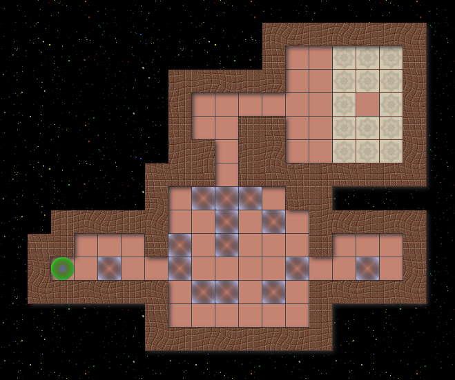 скриншот сайта Space Sokoban